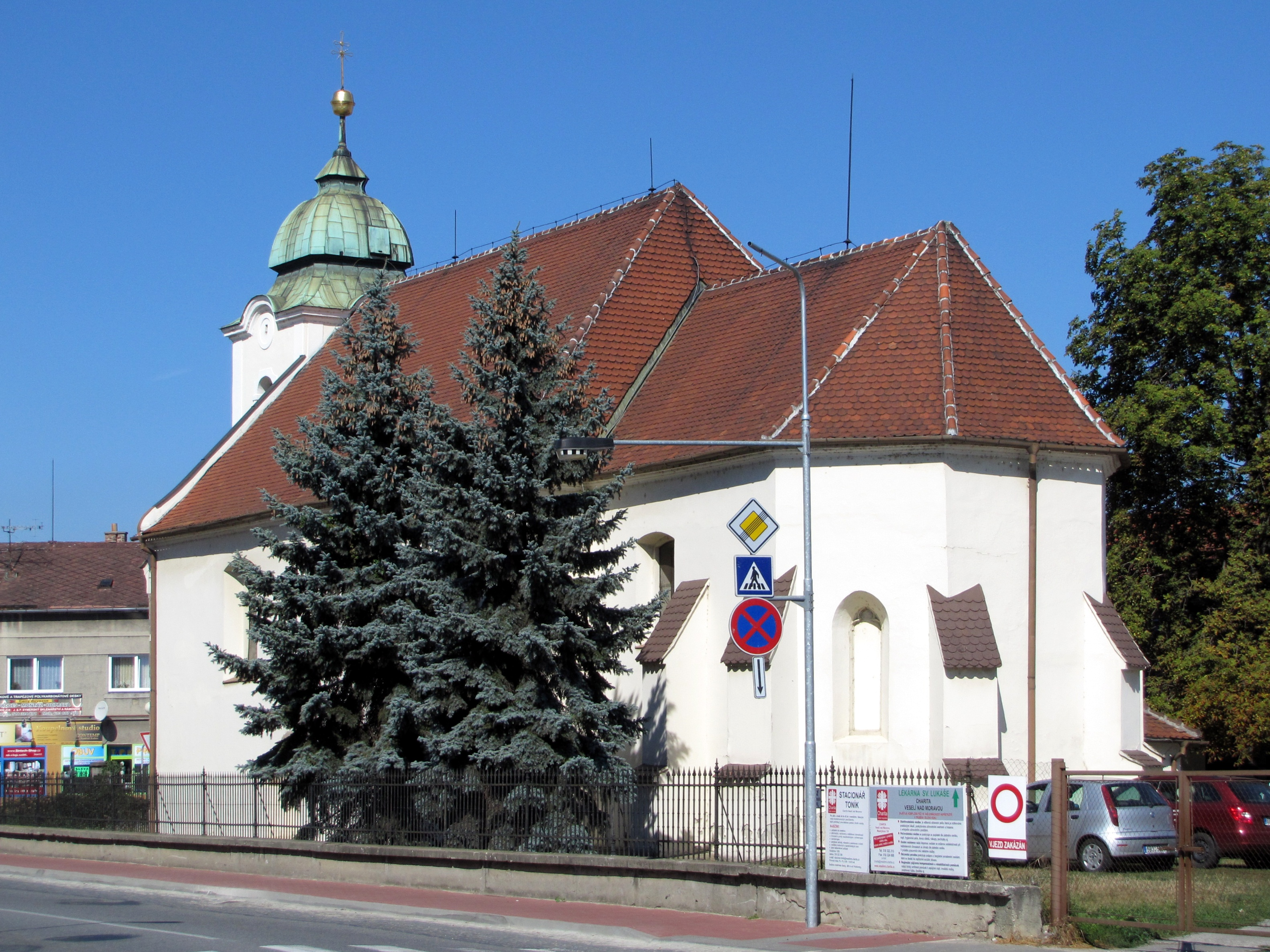 Kostel Panny Marie ve Veselí nad Moravou